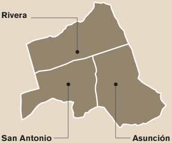 Mapa de los distritos del cantón de Bel/eacute;n, provincia de Heredia, Costa Rica.